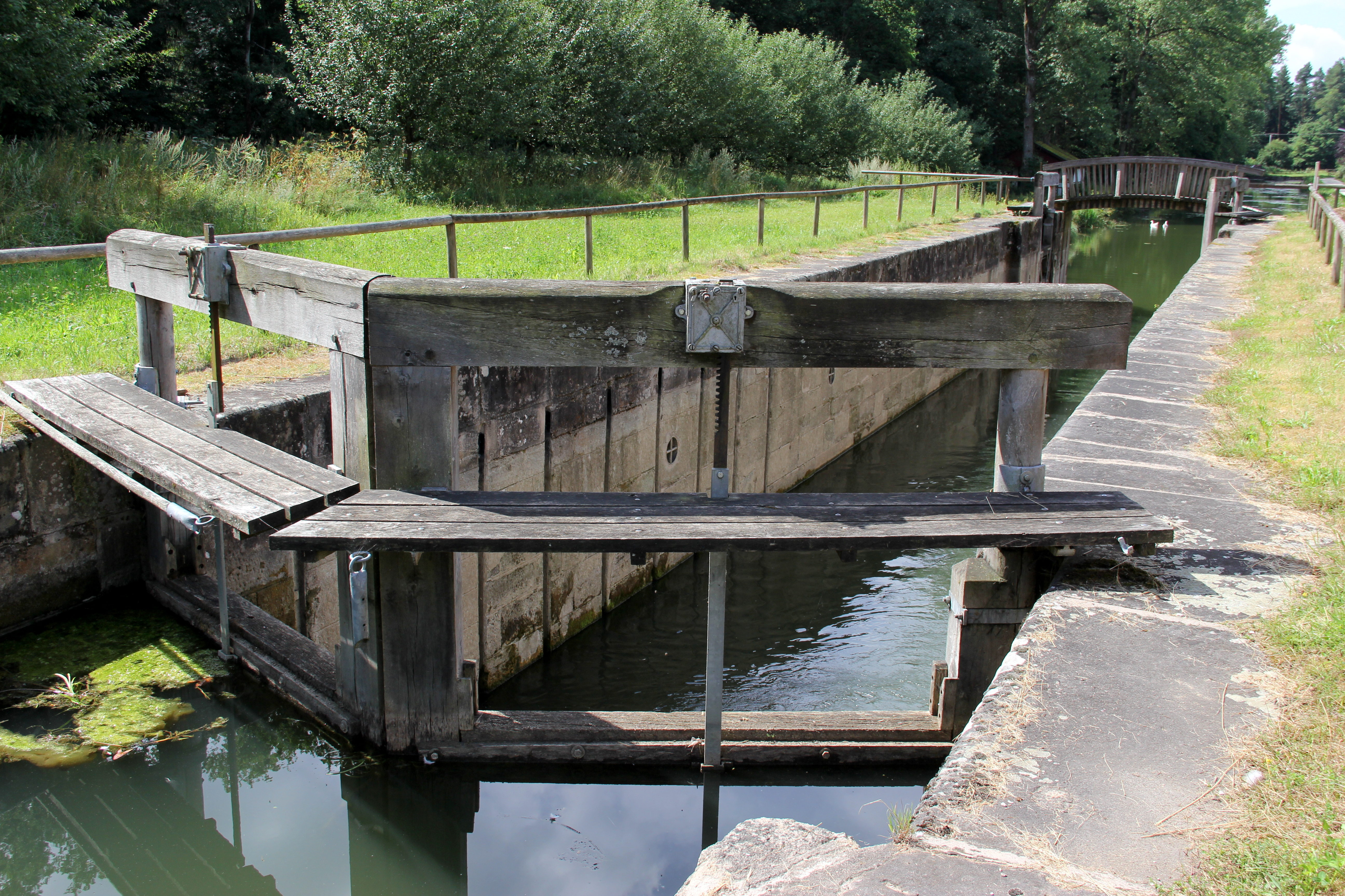 Schleuse 33